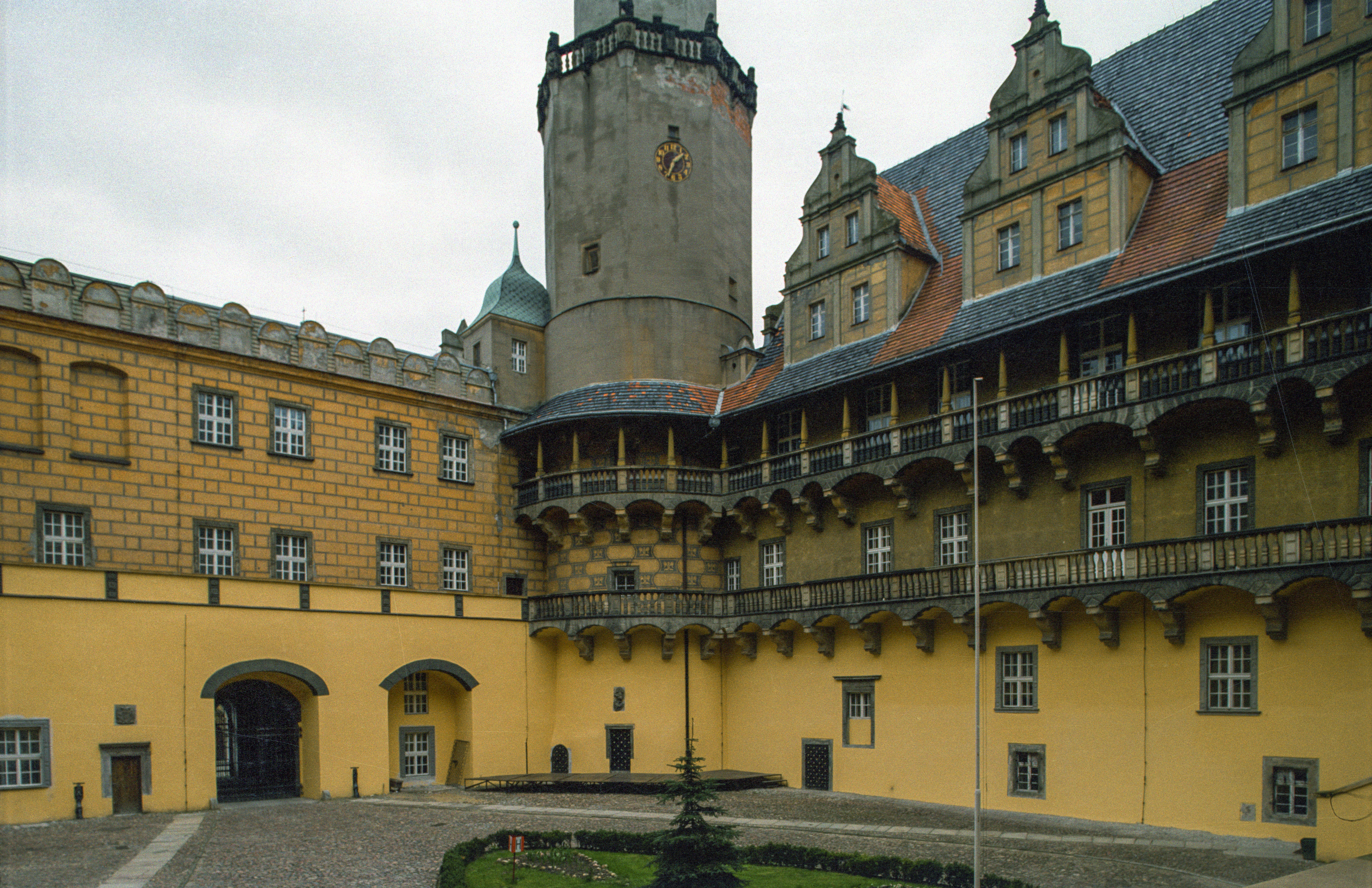 Oleśnica